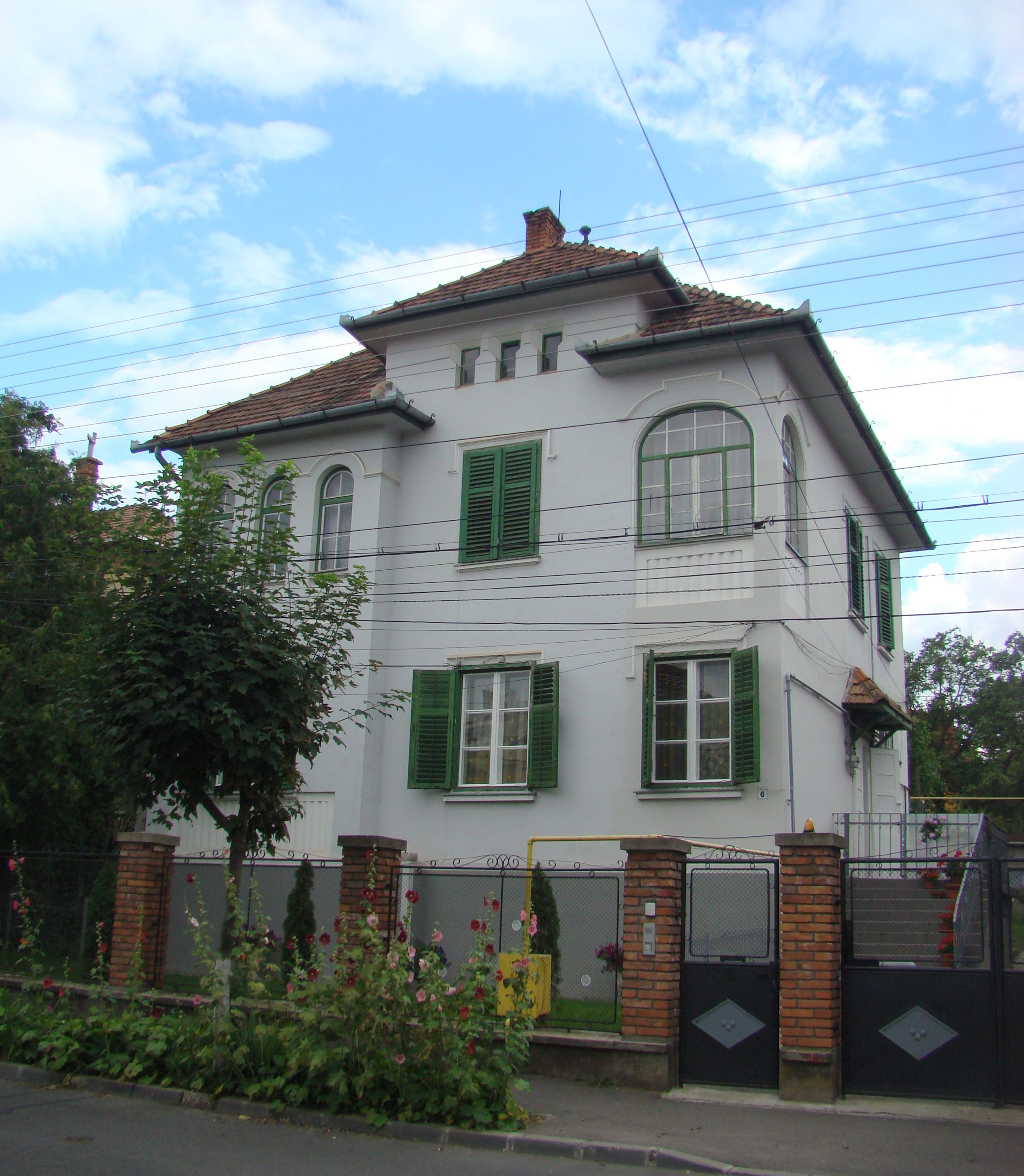 Clădire monument istoric, str.Nicolae Iorga, nr.6 (Casa în care au locuit soții Bârsan)